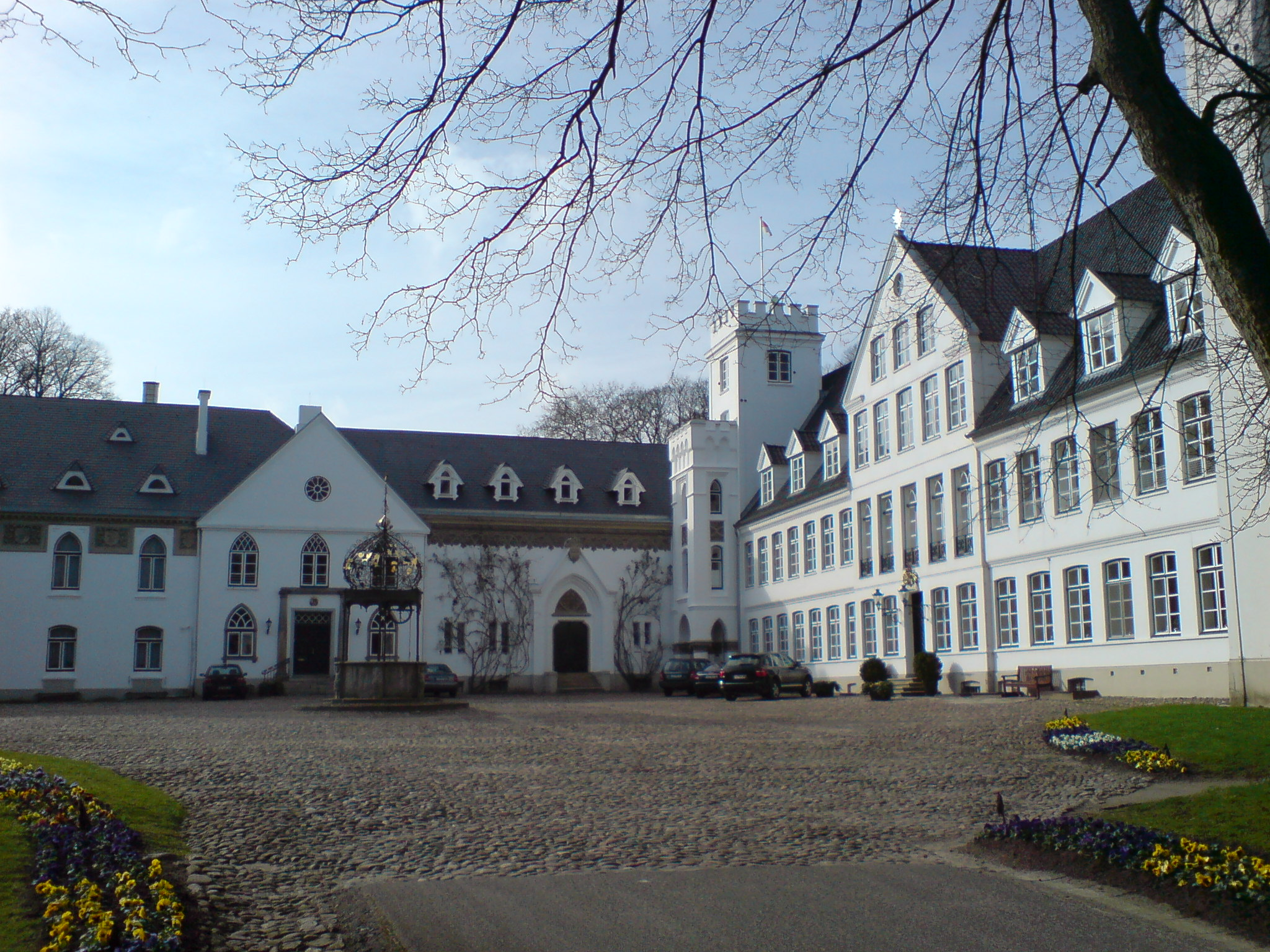 Description=Breitenburg, Hofansicht